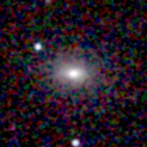 Galaxy NGC 25